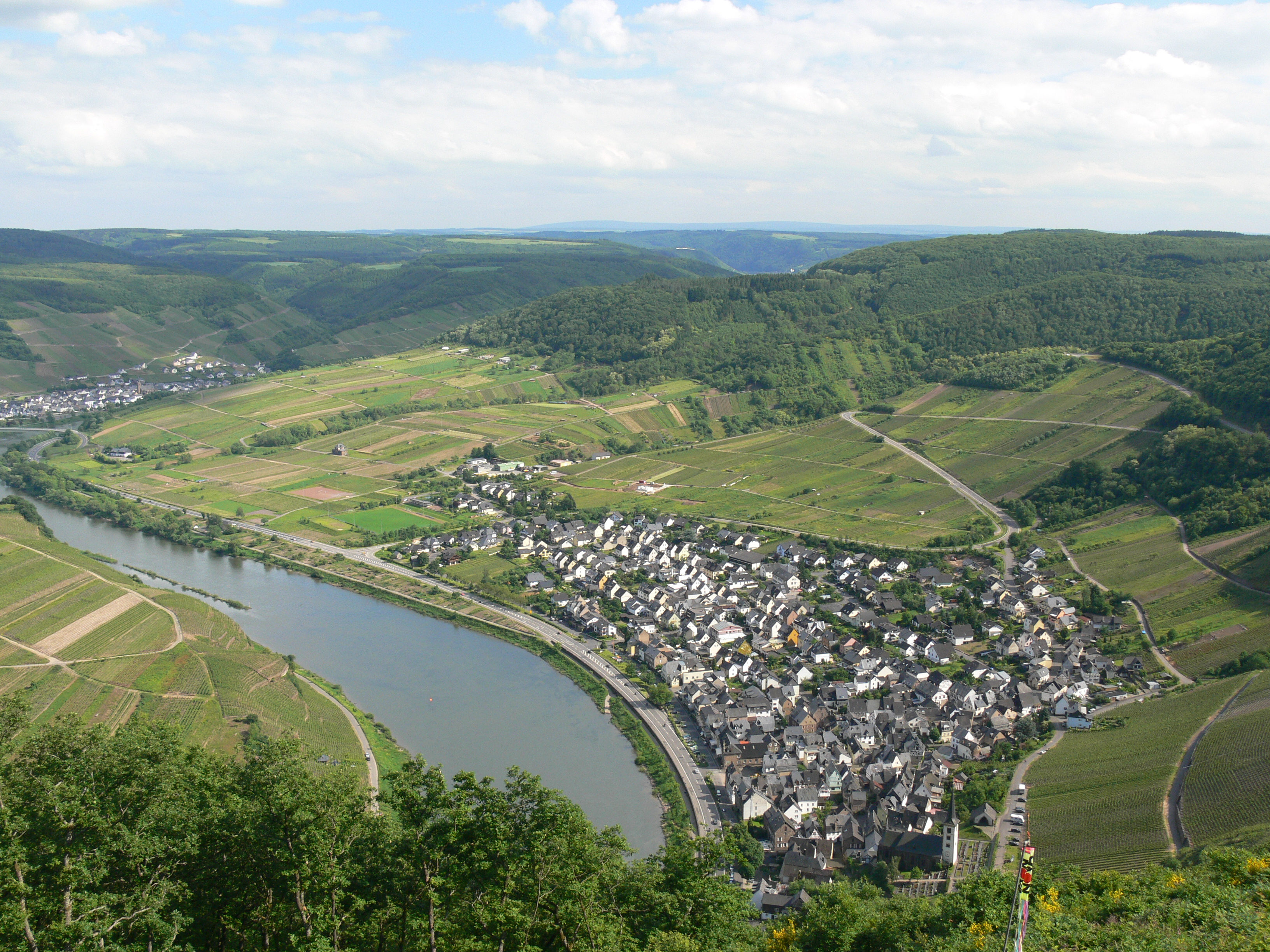 Blick vom Bremmer Gipfelkreuz auf Bremm und die Moselschleife